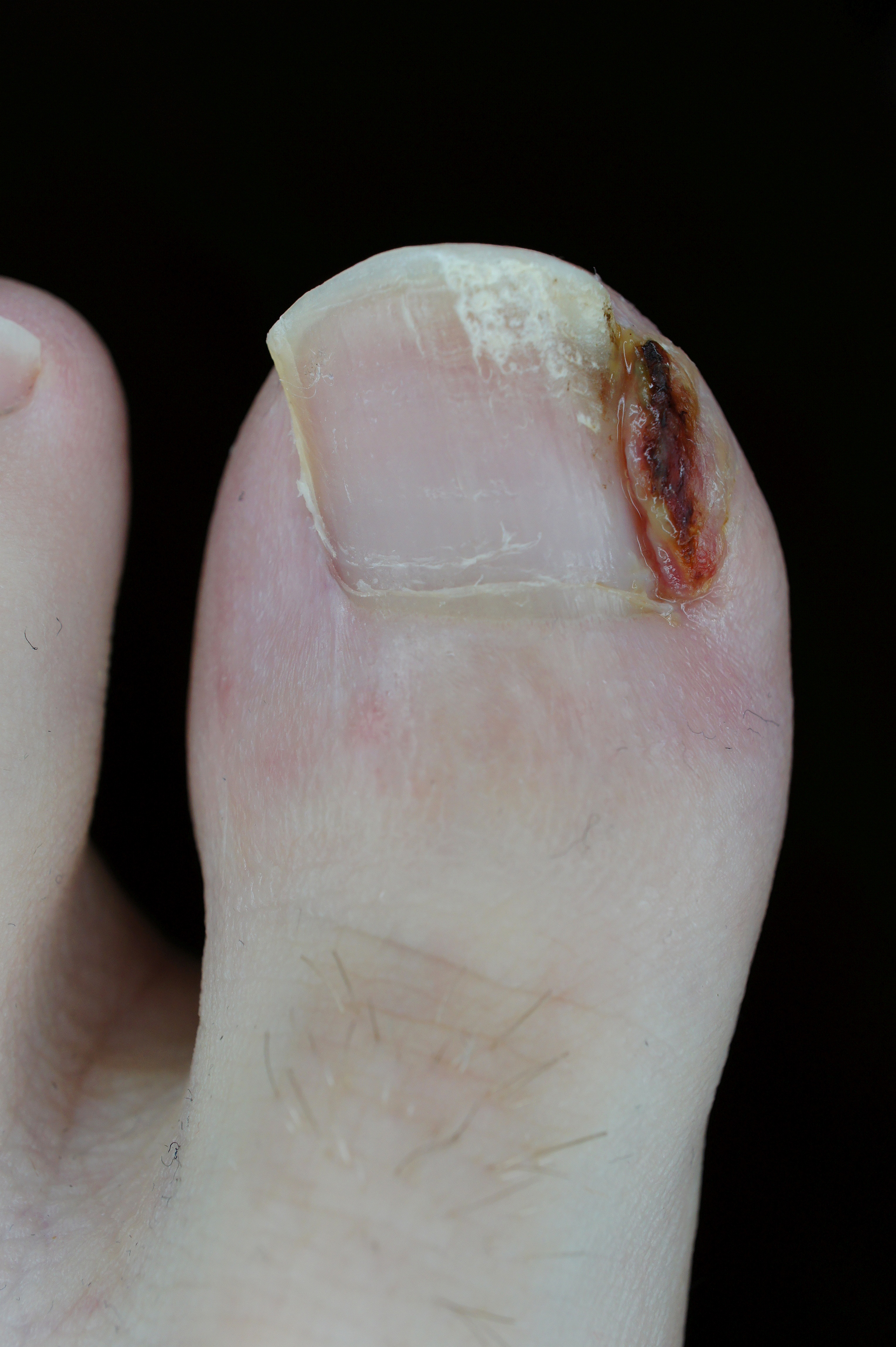 Postoperativer Zustand nach Emmert-Plastik links auf dem Bild. (PD Carls Hannover). Rechte Seite noch in konservativer Behandlung einer Podologin